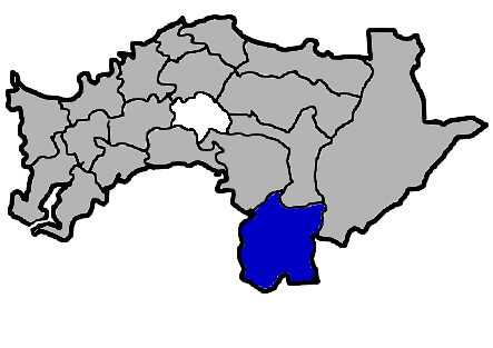 KaurJmeb為編輯中華民國臺灣省嘉義縣大埔鄉，於2005年2月10日所繪。